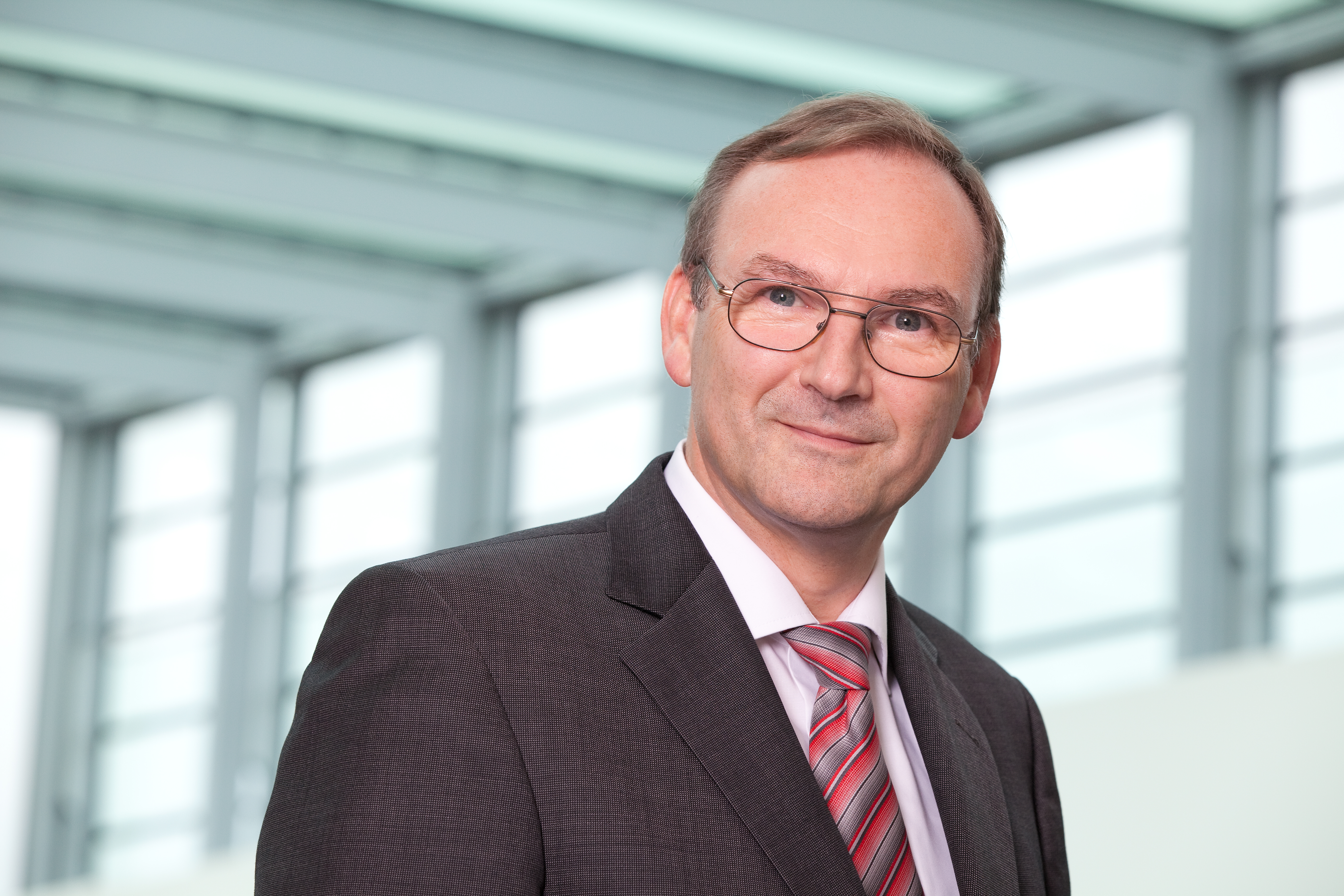 Heinz-Theo Wagner ist Professor für Management und Innovation an der German Graduate School.